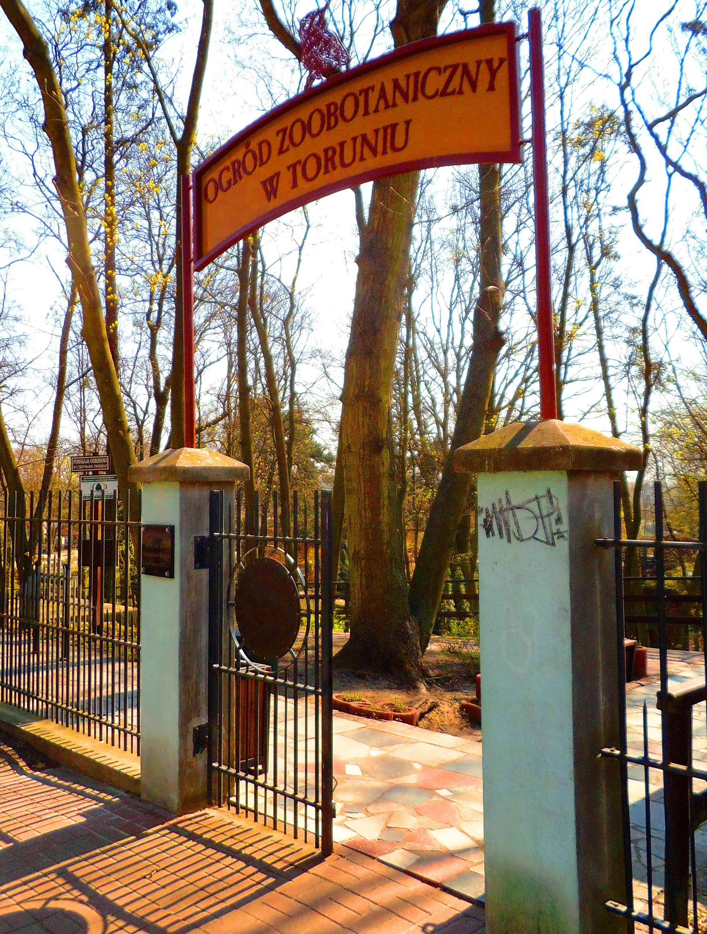 Ogród Zoobotaniczny w Toruniu, wejście